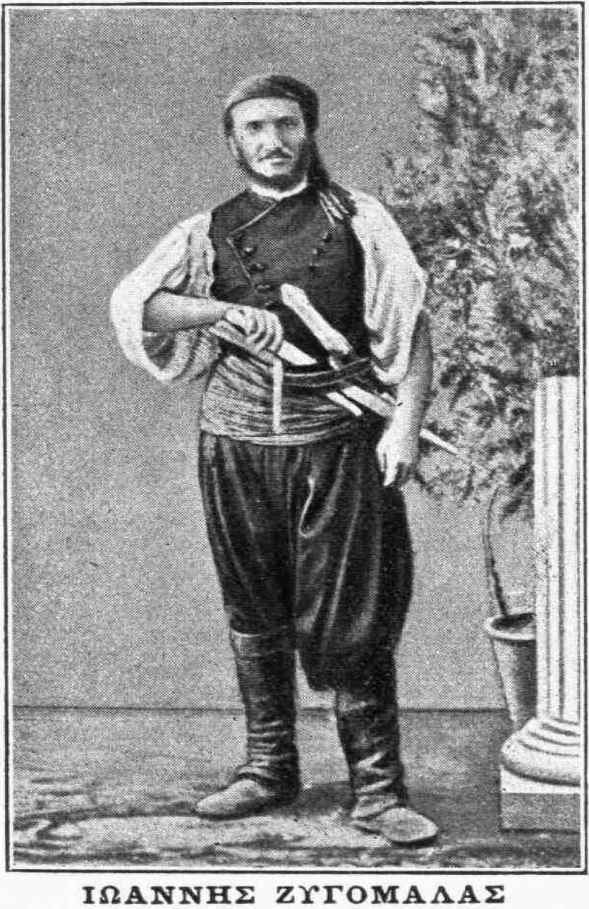 griechischer Feiheitskämpfer, 19. Jahrhundert